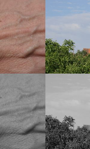 Umsetzung von Farben in ein Schwarz-Weiss-Bild, digital simuliert (Bildbearbeitung gimp, Filter color2bw). Ohne Filterung der Kanäle, somit entsprechend einem panchromatischen Film.